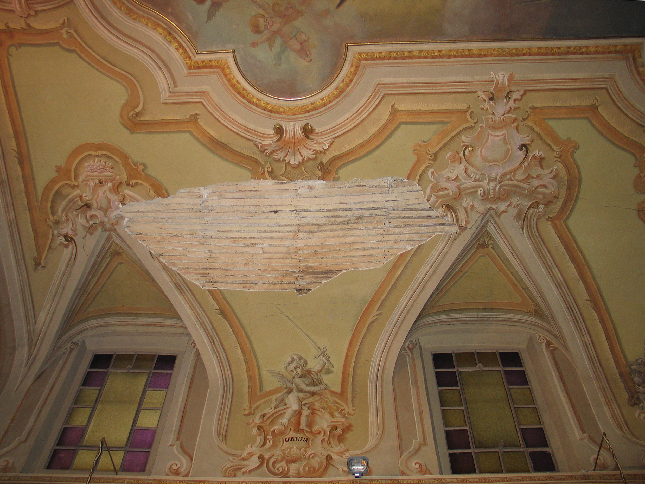 distaccamento dell'intonaco dalla volta